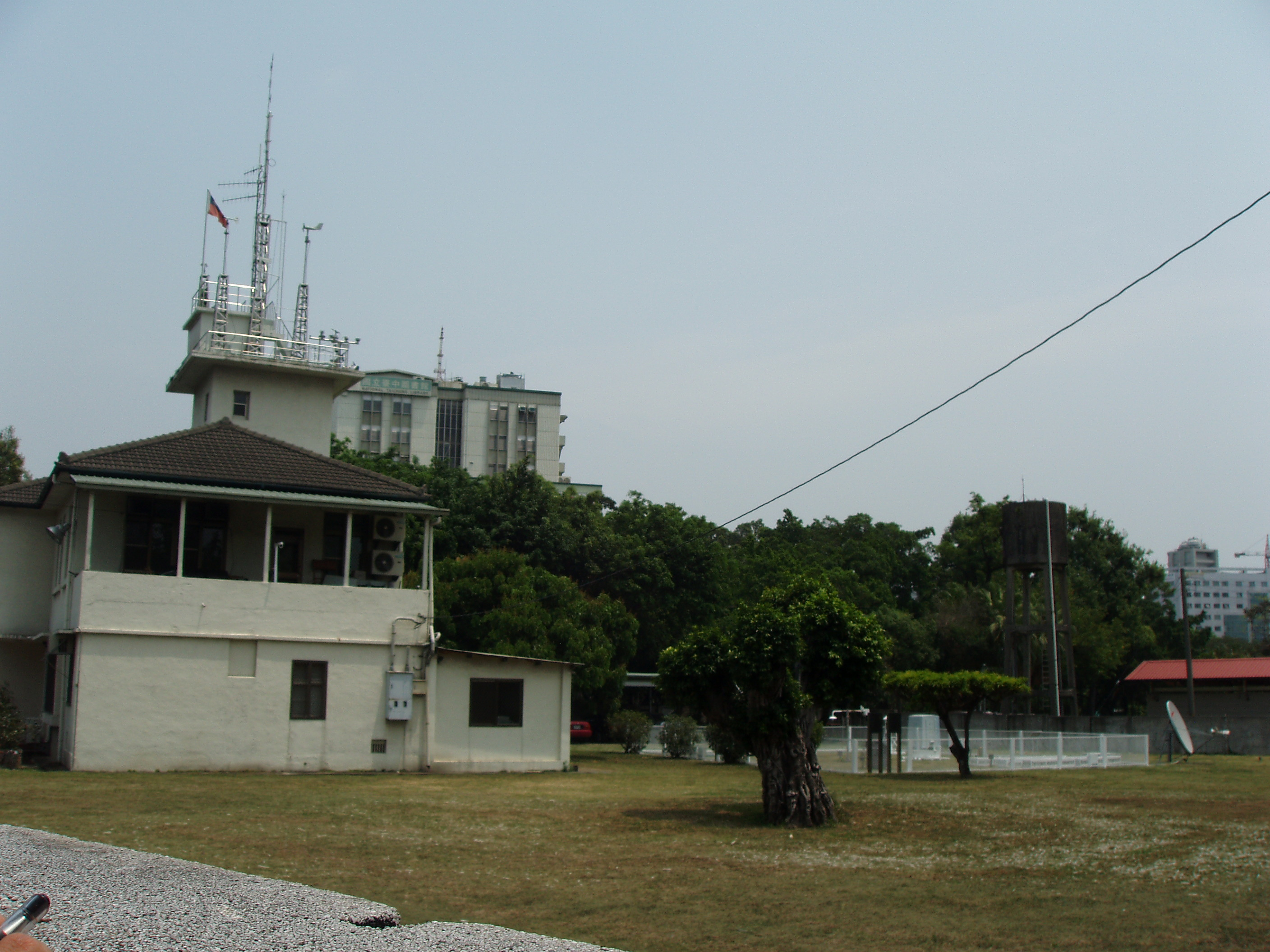 臺中氣象站，臺中公園內。